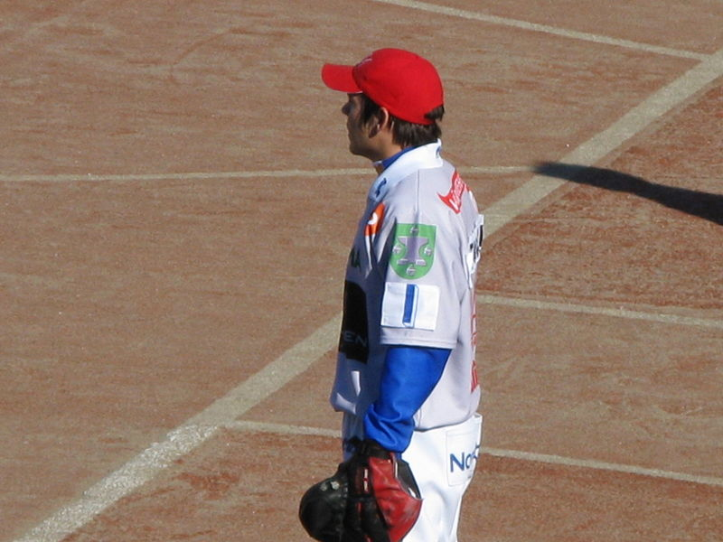 Description